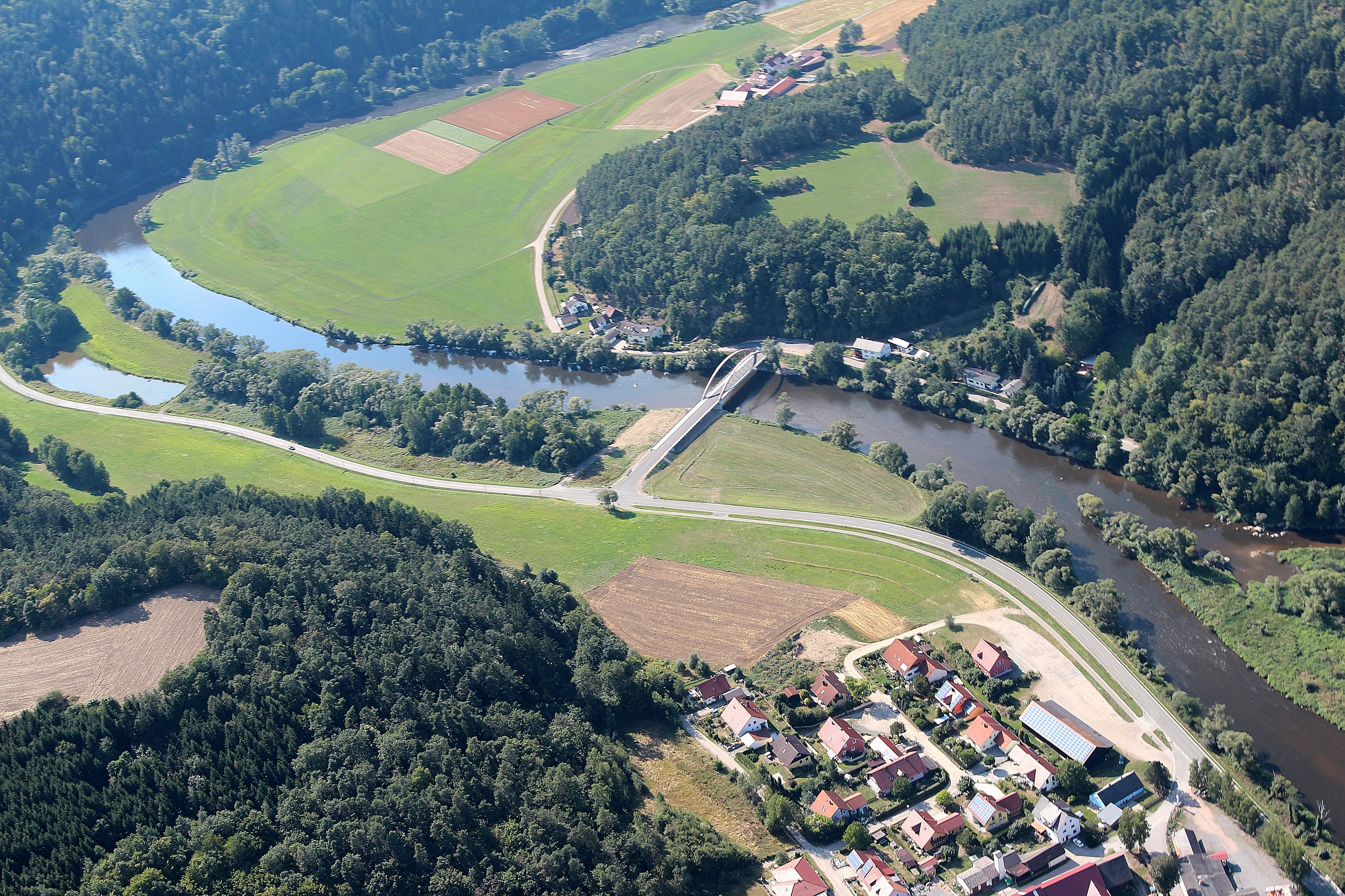 Stefling am Fluss Regen, Überfuhr und Weißenhof (oberer Bildrand), Stadt Nittenau, Landkreis Schwandorf, Oberpfalz, Bayern